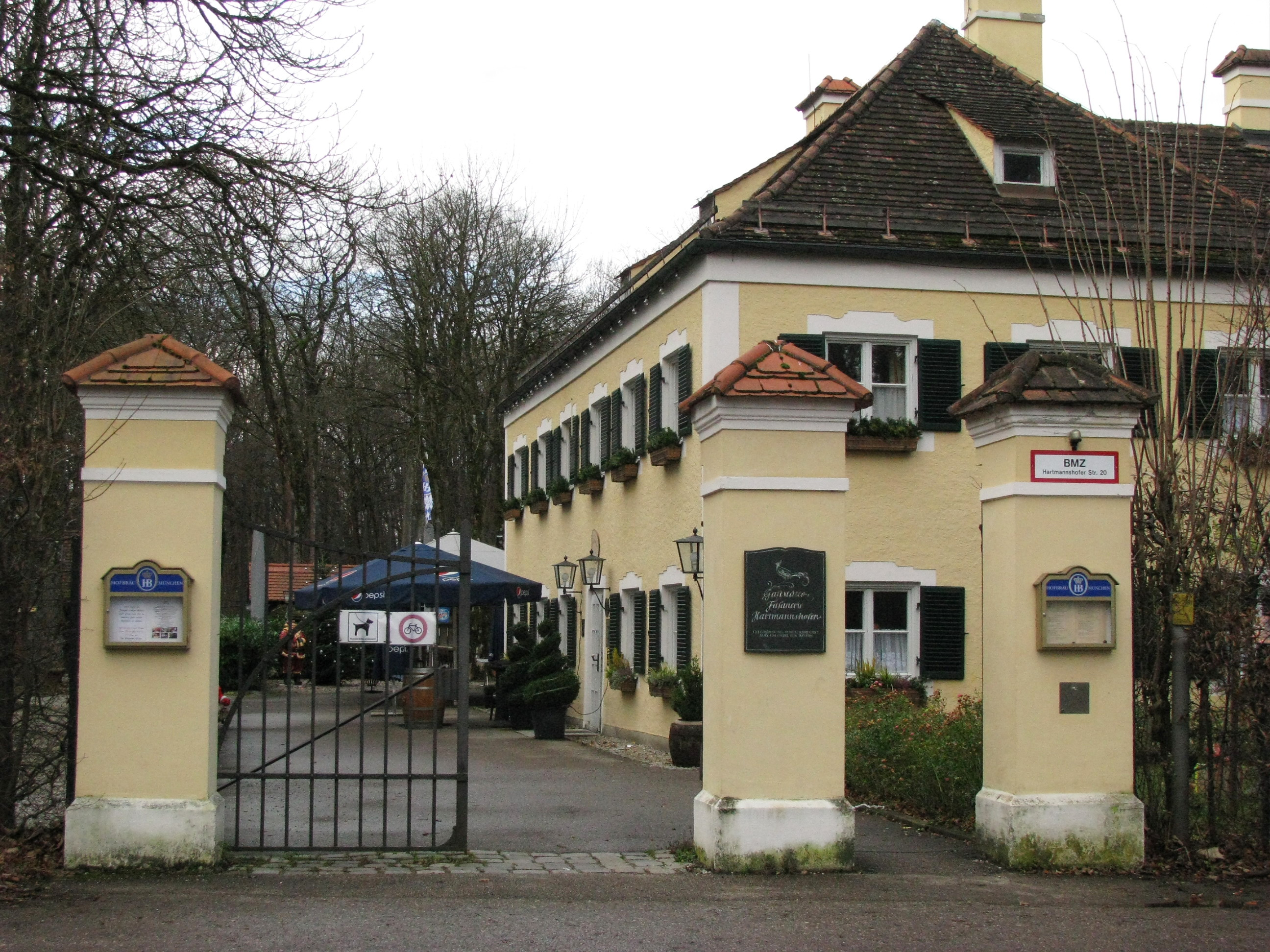 Gaststätte Fasanerie im Hartmannshofer Wald